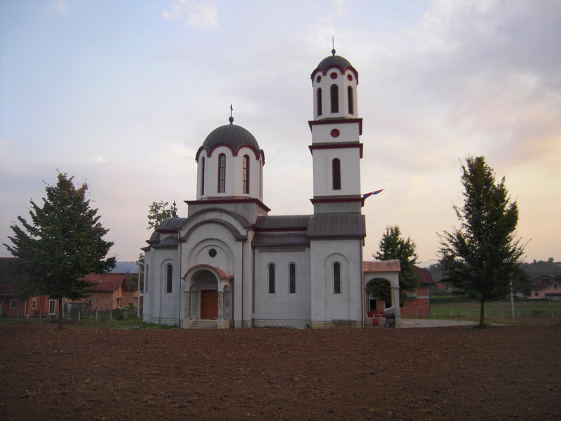 Crkva Svete Petke (Kuljani, Banja Luka)